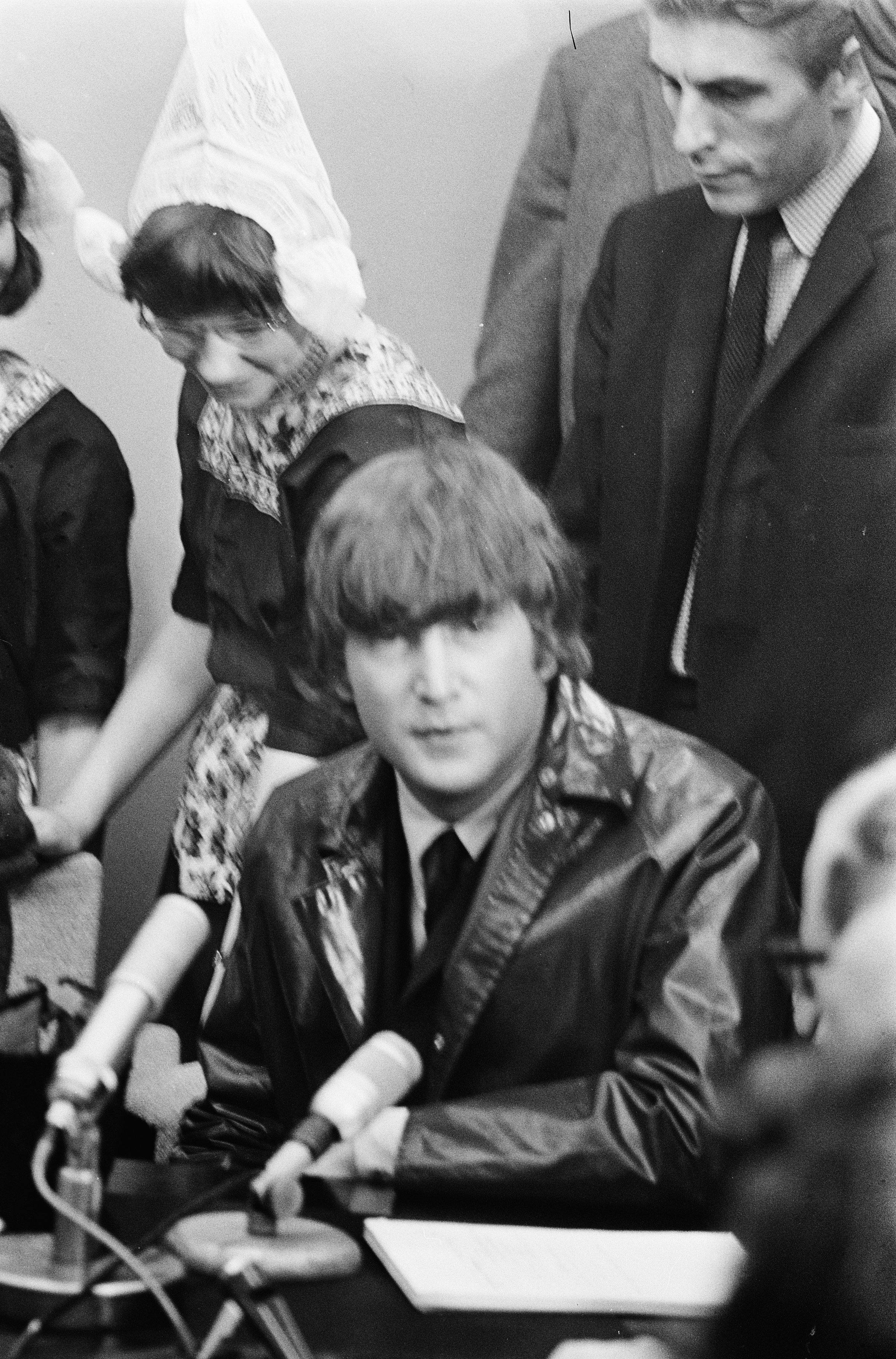 Collectie / Archief : Fotocollectie Anefo Reportage / Serie : [ onbekend ] Beschrijving : Aankomst Beatles op Schiphol, de Beatles tijdens persconferentie. John Lennon Datum : 5 juni 1964 Locatie : Noord-Holland, Schiphol Trefwoorden : muziek, muzikanten, persconferenties, popgroepen, portretten Persoonsnaam : Lennon, John Instellingsnaam : Beatles Fotograaf : Pot, Harry / Anefo Auteursrechthebbende : Nationaal Archief Materiaalsoort : Negatief (zwart/wit) Nummer archiefinventaris : bekijk toegang 2.24.01.05 Bestanddeelnummer : 916-5131